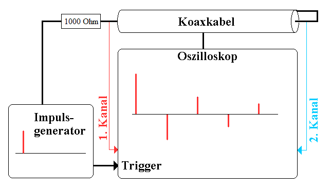 Impulse bei offenem Kabel, Wellenimpedanz, Kurzschluss